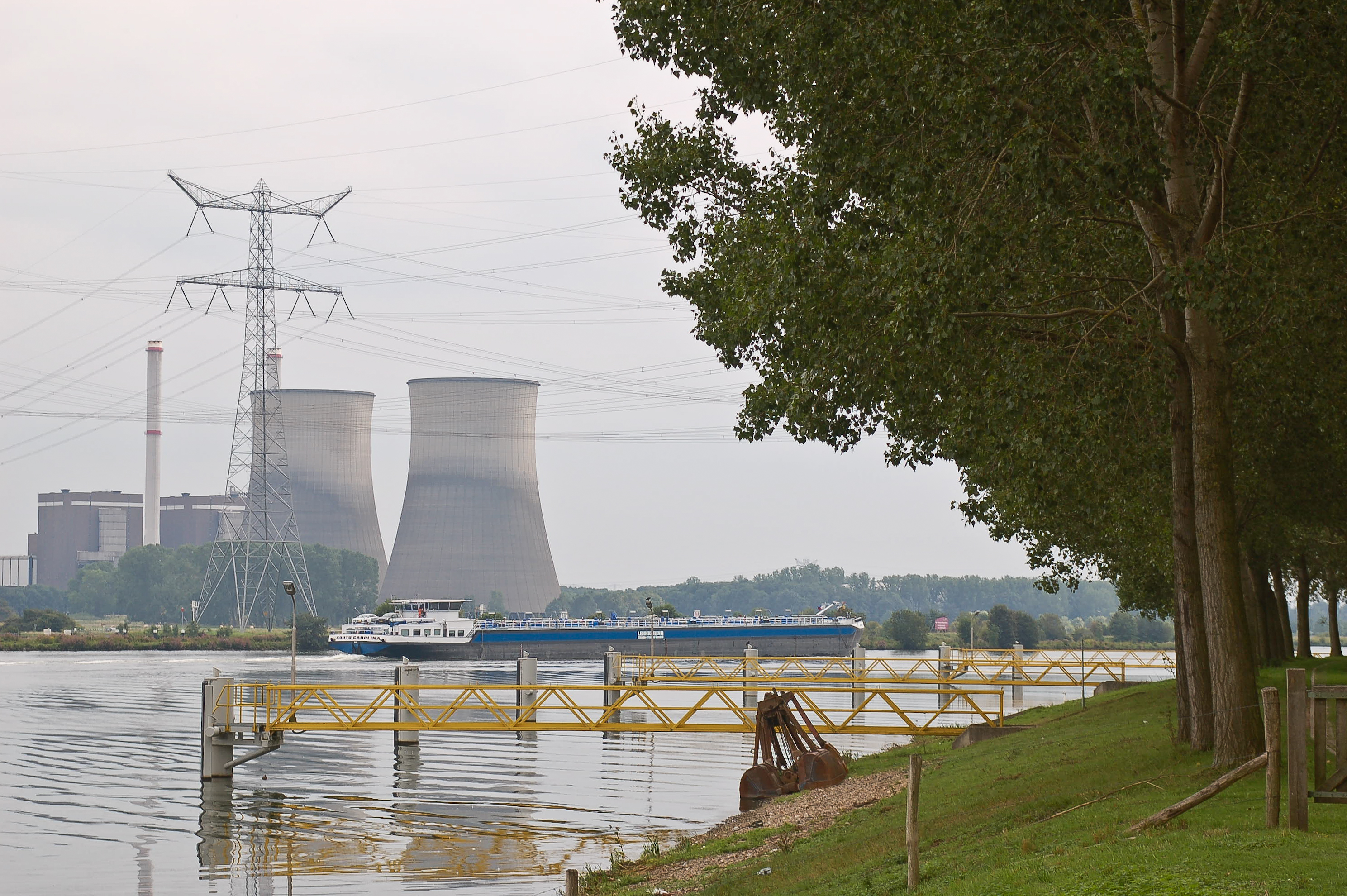 Das Tankschiff South Carolina (Baujahr 2009, ENI Nummer 02332197) der Reederei Lehnkering verlässt den Vorhafen der Schleuse Heel (Lateralkanal) nach Bergschleusung in Fahrtrichtung Maasbracht, im Hintergrund das Gaskraftwerk Clauscentrale in Maasbracht